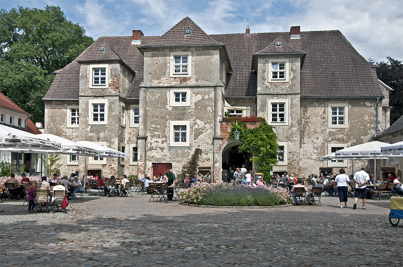 Wasserschloss Mellenthin, Frontseite, 2009